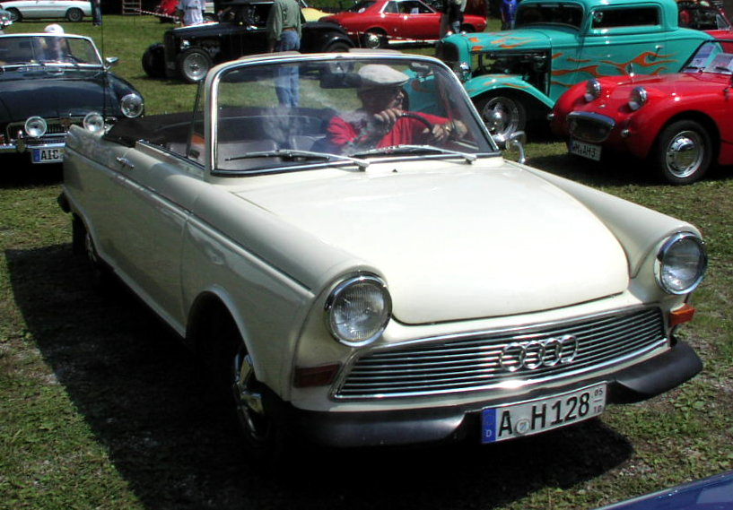 DKW F12 Roadster